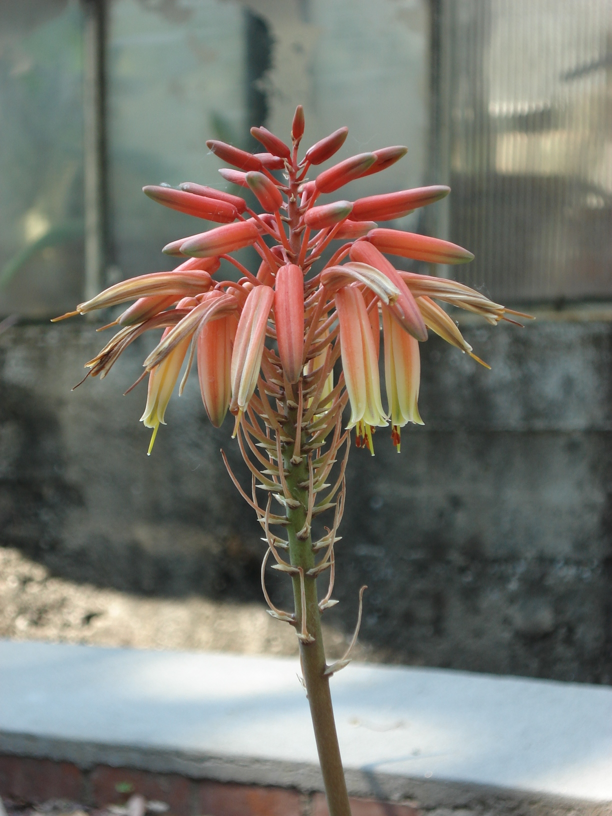 Flowers of Aloe brachystachys (syn. Aloe lastii)